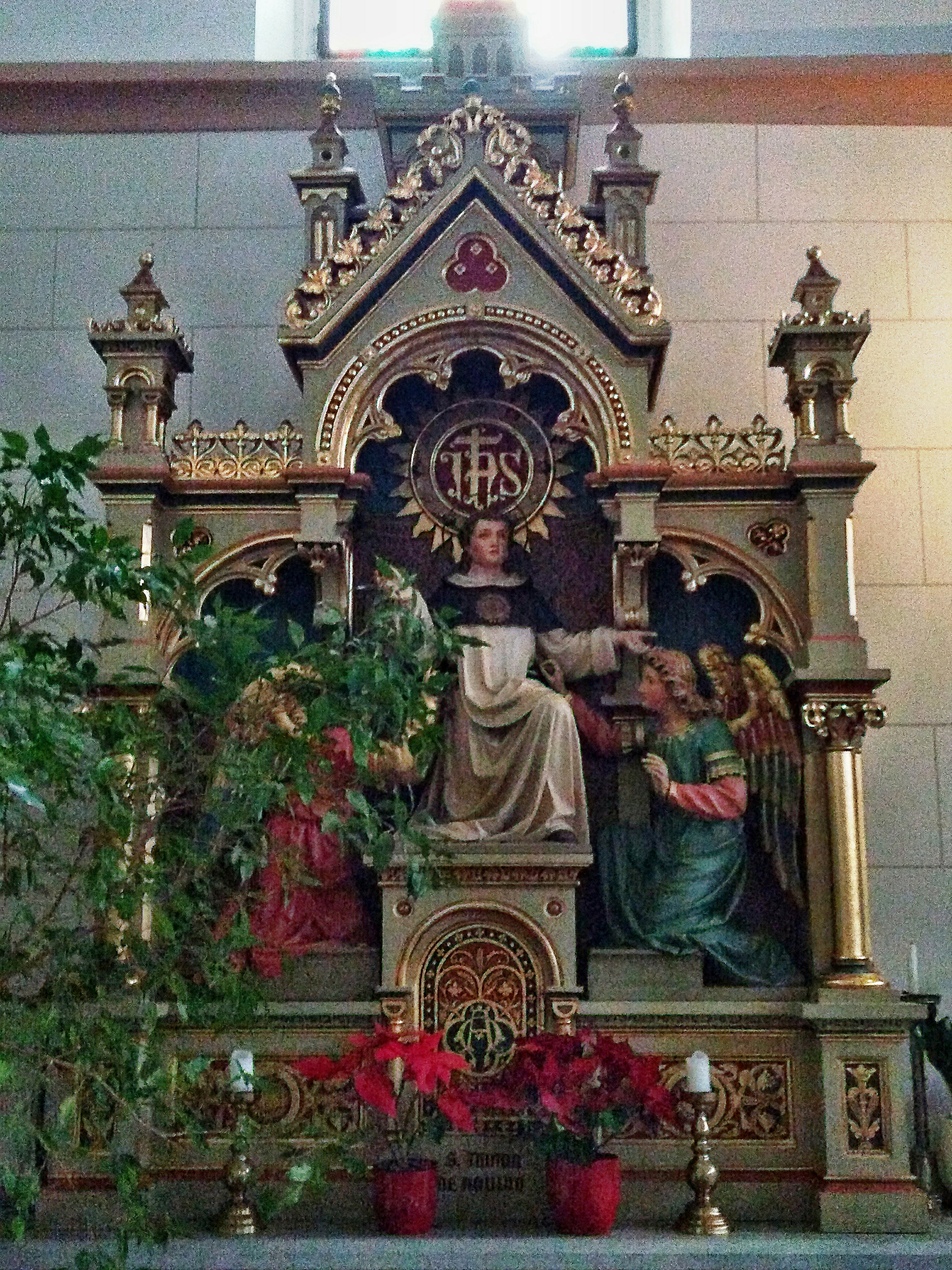 Seitenaltar mit der Darstellung Thomas von Aquins in der Kirche zum hl. Josef in St. Michael in Eppan - St. Michele Appiano, Südtirol/Trentino-Alto Adige, Italien